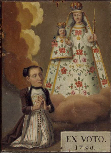 Votivtafel, Öl auf Holz, aus der Wallfahrtskapelle St. Maria Niederrickenbach (NW)